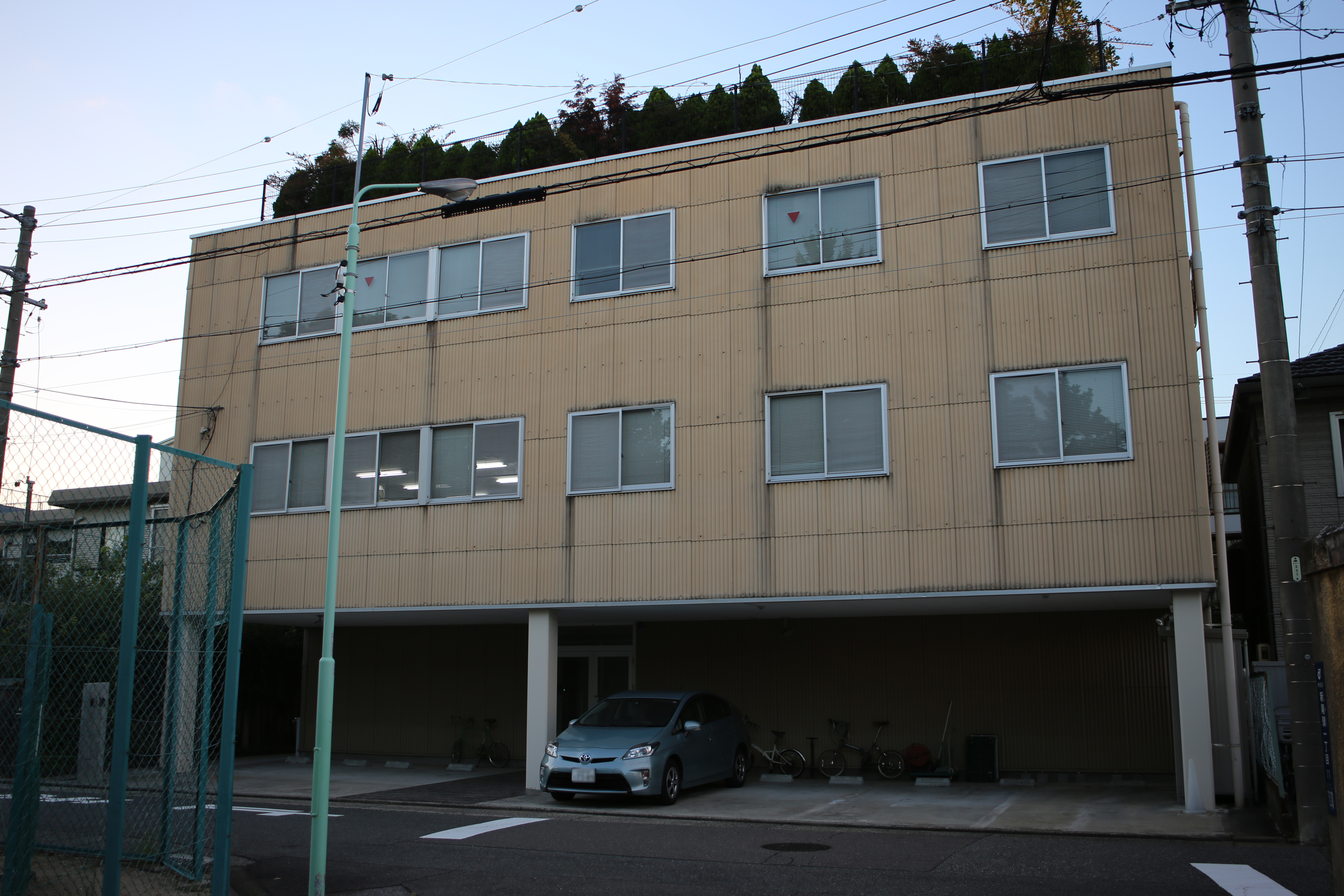 名古屋市熱田区新尾頭一丁目の創建本店を南側公道より撮影。ただし、ナンバープレートにつき画像処理済。